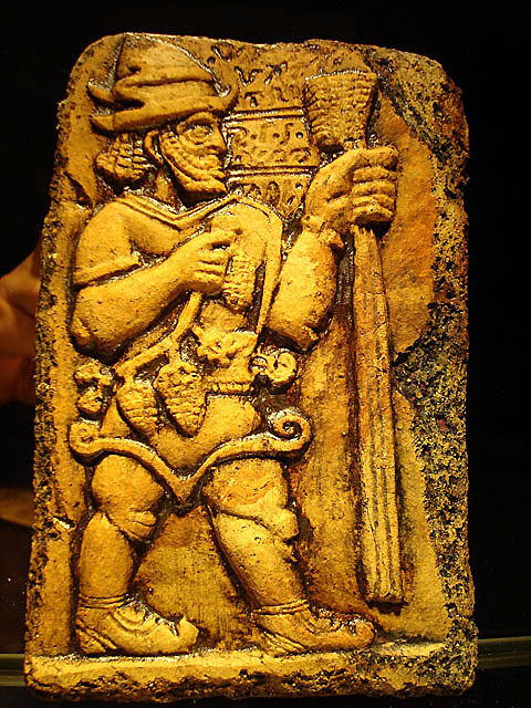 Hitit Gök Tanrısı - Fırtına Tanrısı